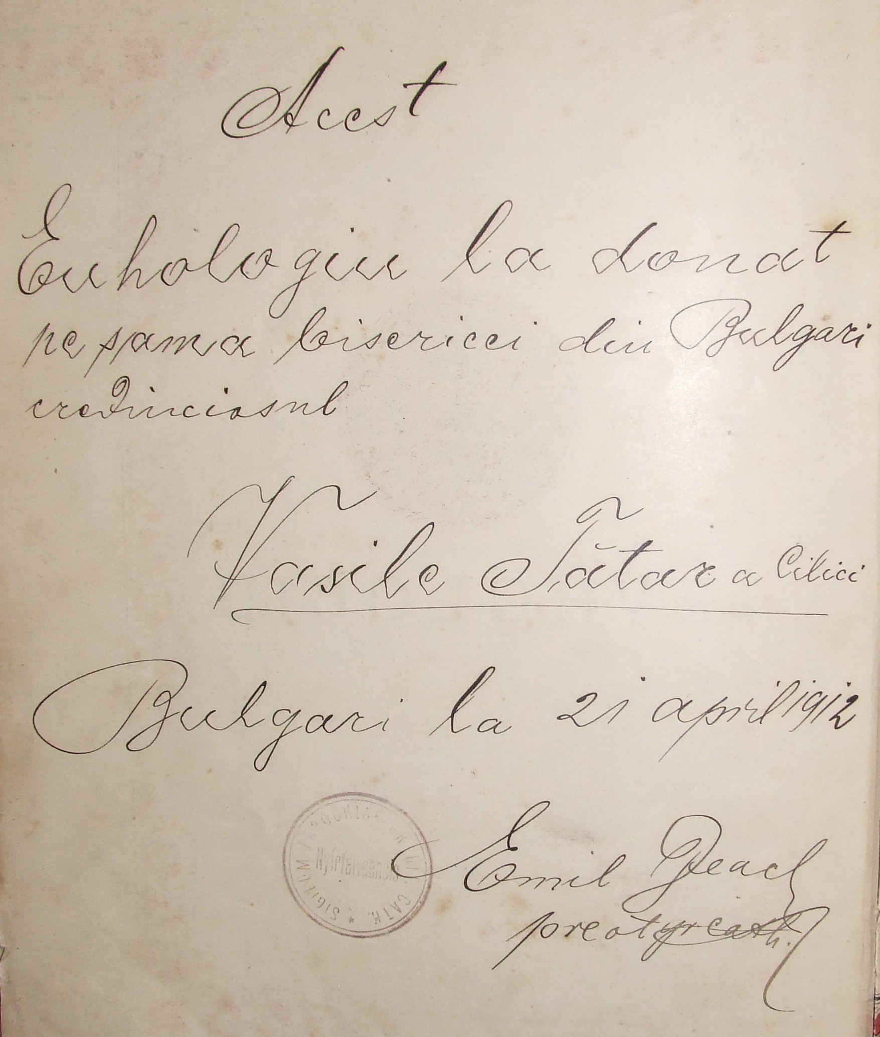 Biserica de lemn din Bulgari, judeţul Sălaj. Înscris pe Evhologiul bisericii, tipărit la Bucureşti în 1910.